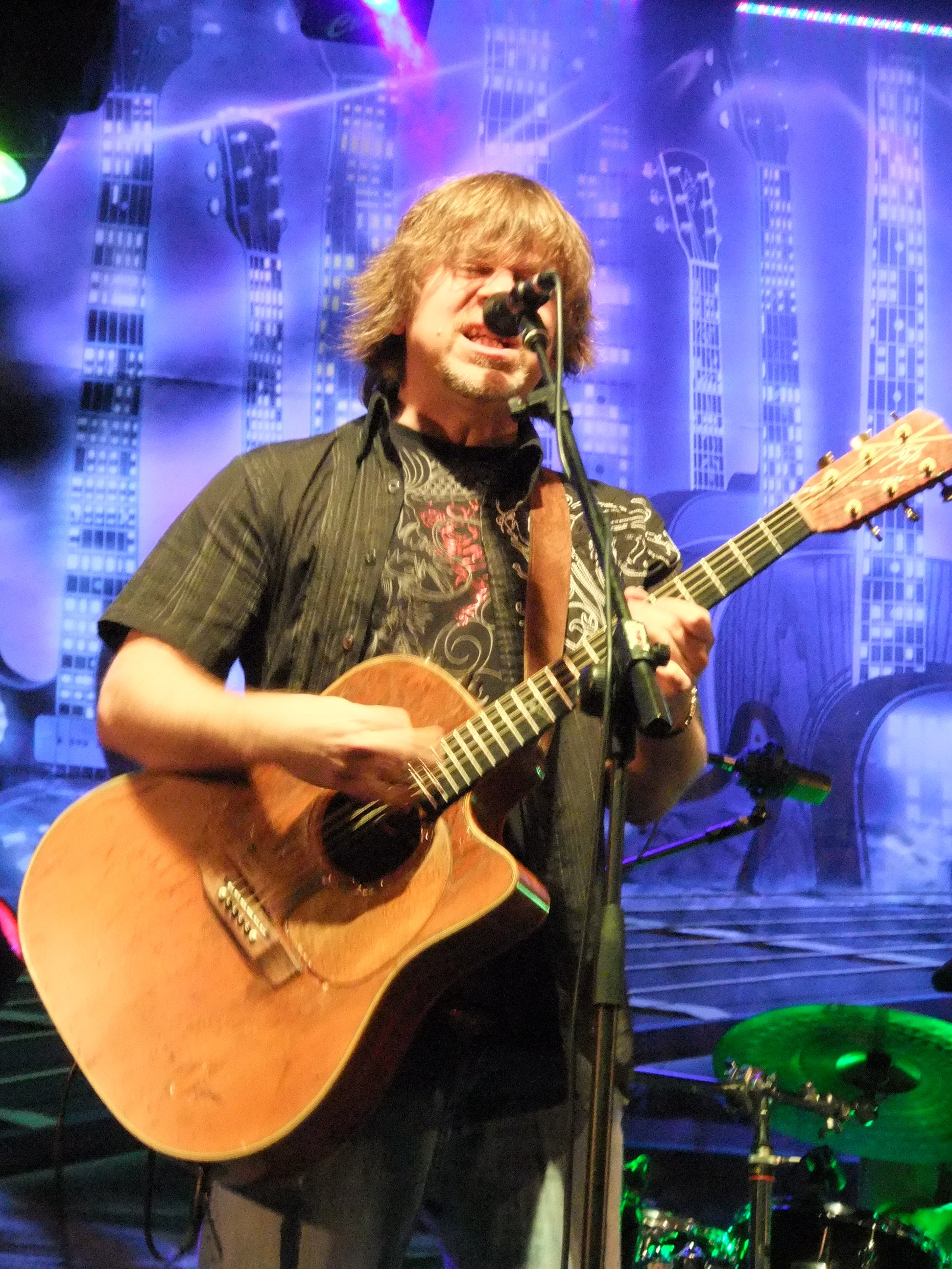 Monte Montgomery si esibisce al guitar festival di Soave il 2 maggio 2010